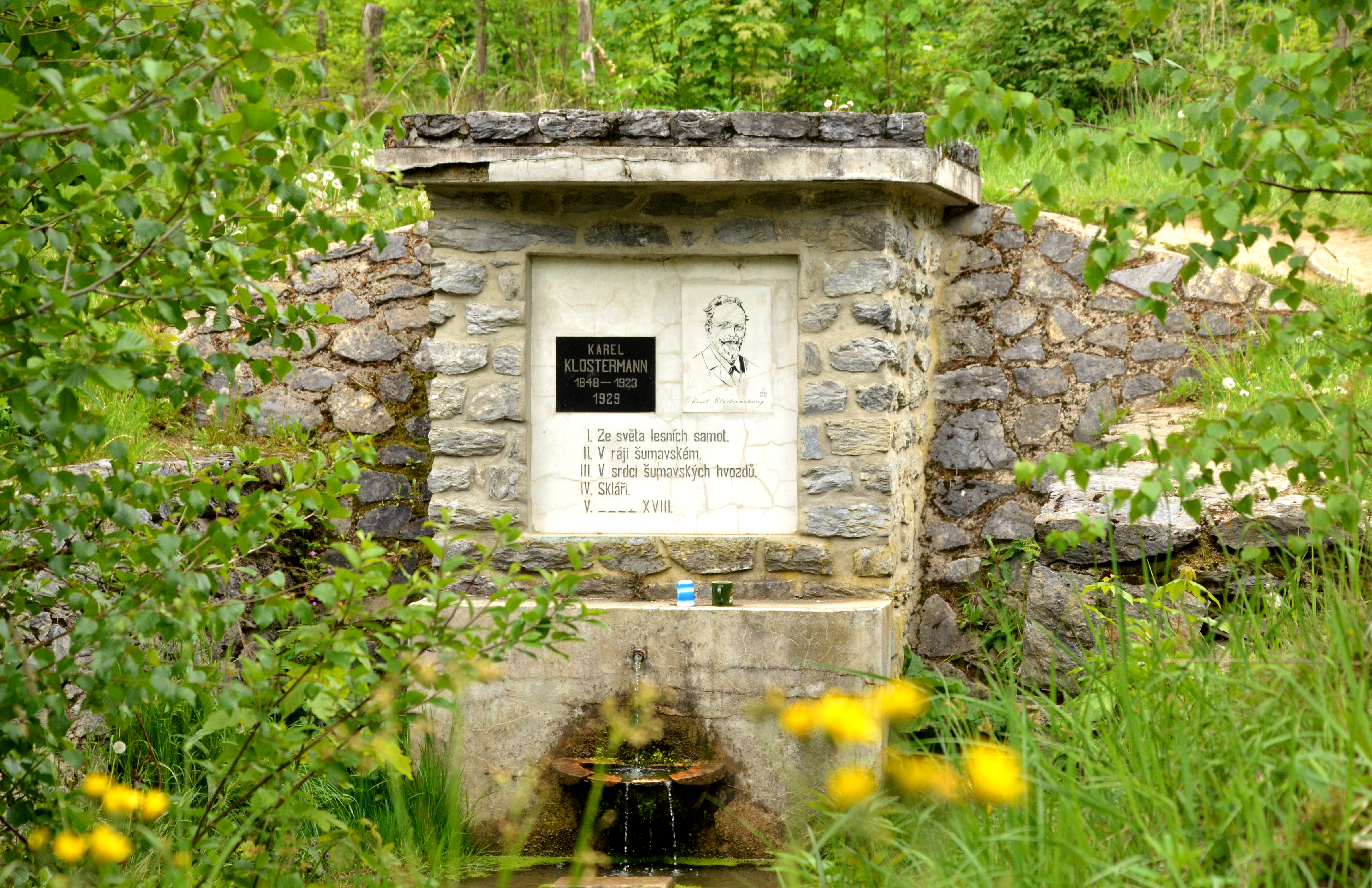 Studánka Karla Klostermann